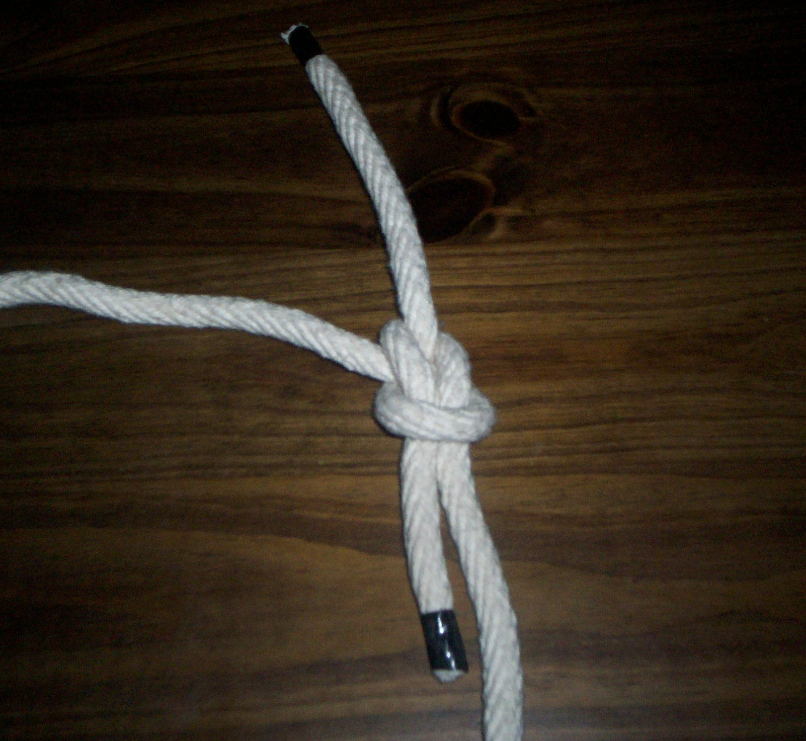 As de guía terminado Realización del nudo "As de guía" paso 5